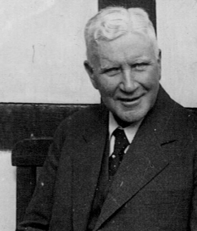 Friedrich von Velsen (1871–1953), preußischer Regierungspräsident von Hannover, Foto: um 1940